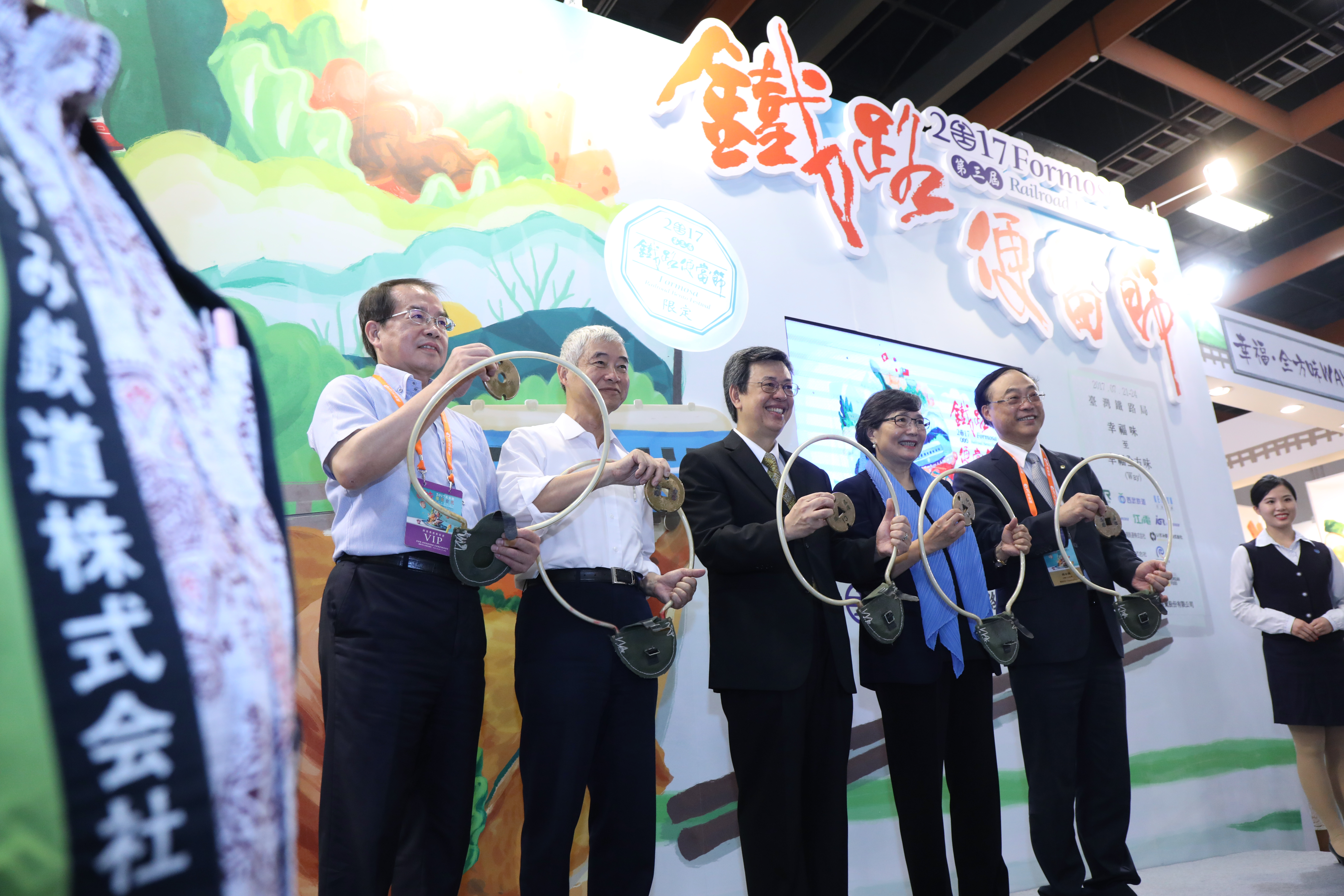 2017台灣美食展，中華民國副總統陳建仁、交通部部長賀陳旦、台灣觀光協會會長葉菊蘭、交通部觀光局局長周永暉出席2017鐵路便當節開幕典禮。